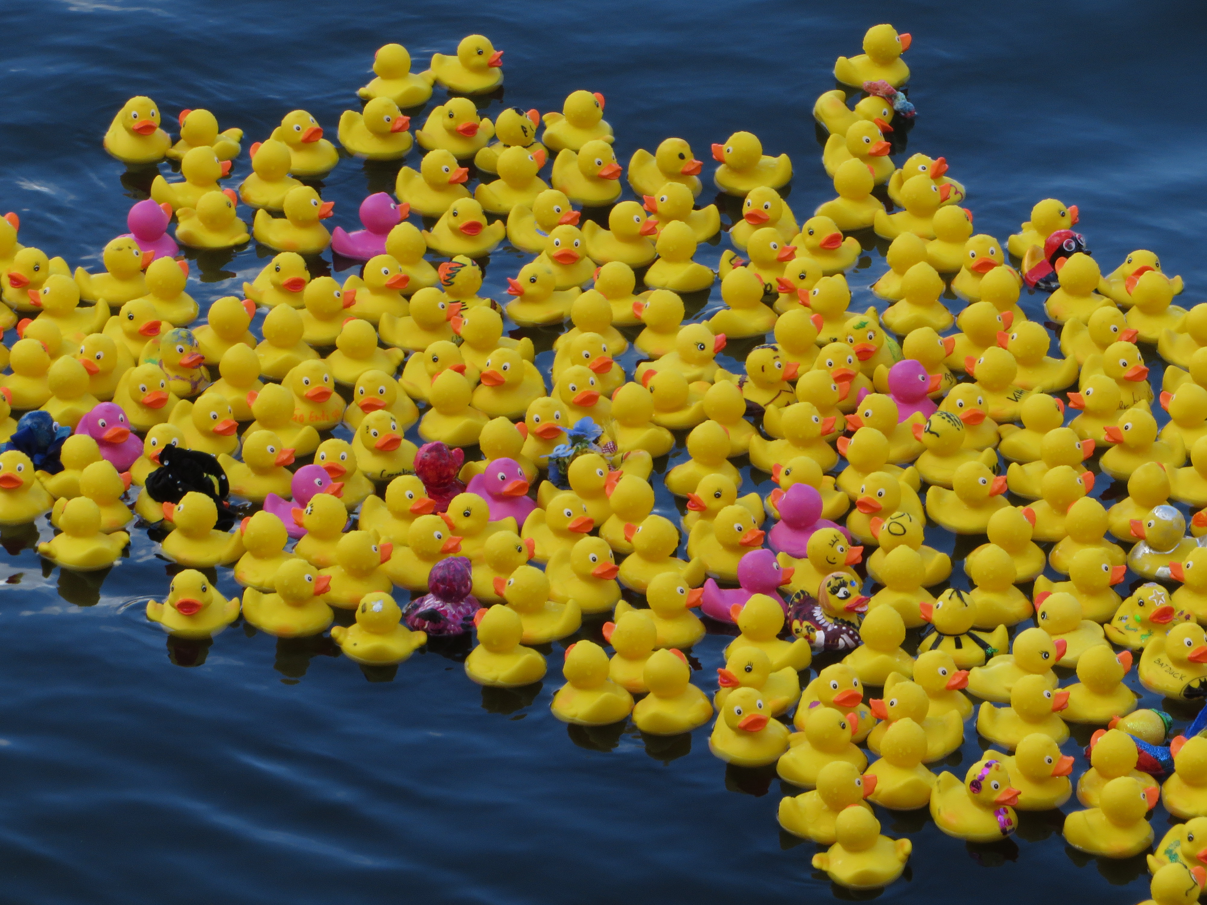 Entenrennen Flensburg 2014 Bild C,DasRennen,038